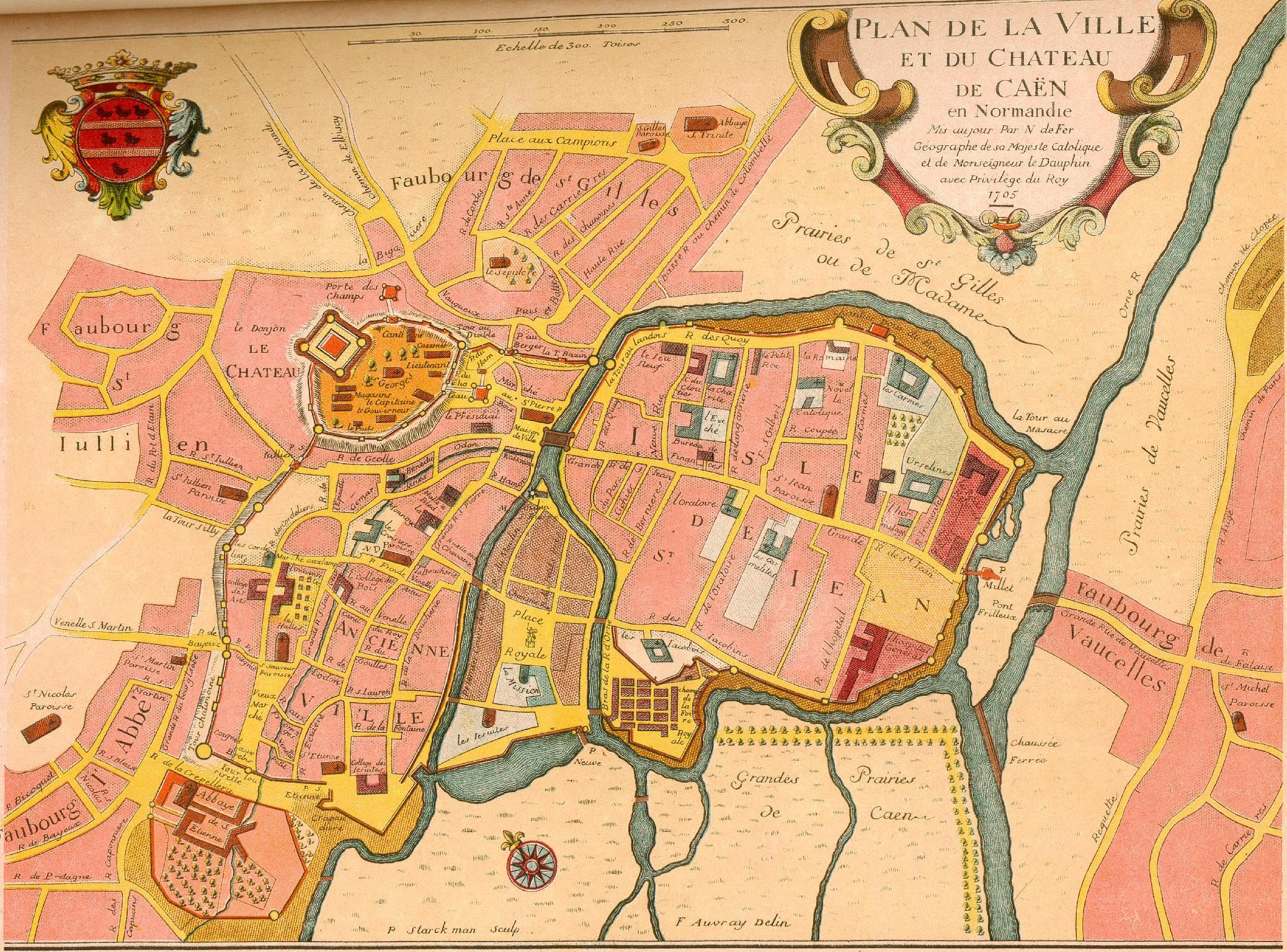 «Plan de la ville et du château de Caen en Normandie. Mis à jour par N de Fer Géographe de sa Majesté Catholique et de Monseigneur le Dauphin avec Privilège du Roy. 1705»